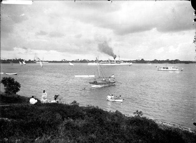 Daressalam, Hafenbild, engl. Kreuzer im Hafen